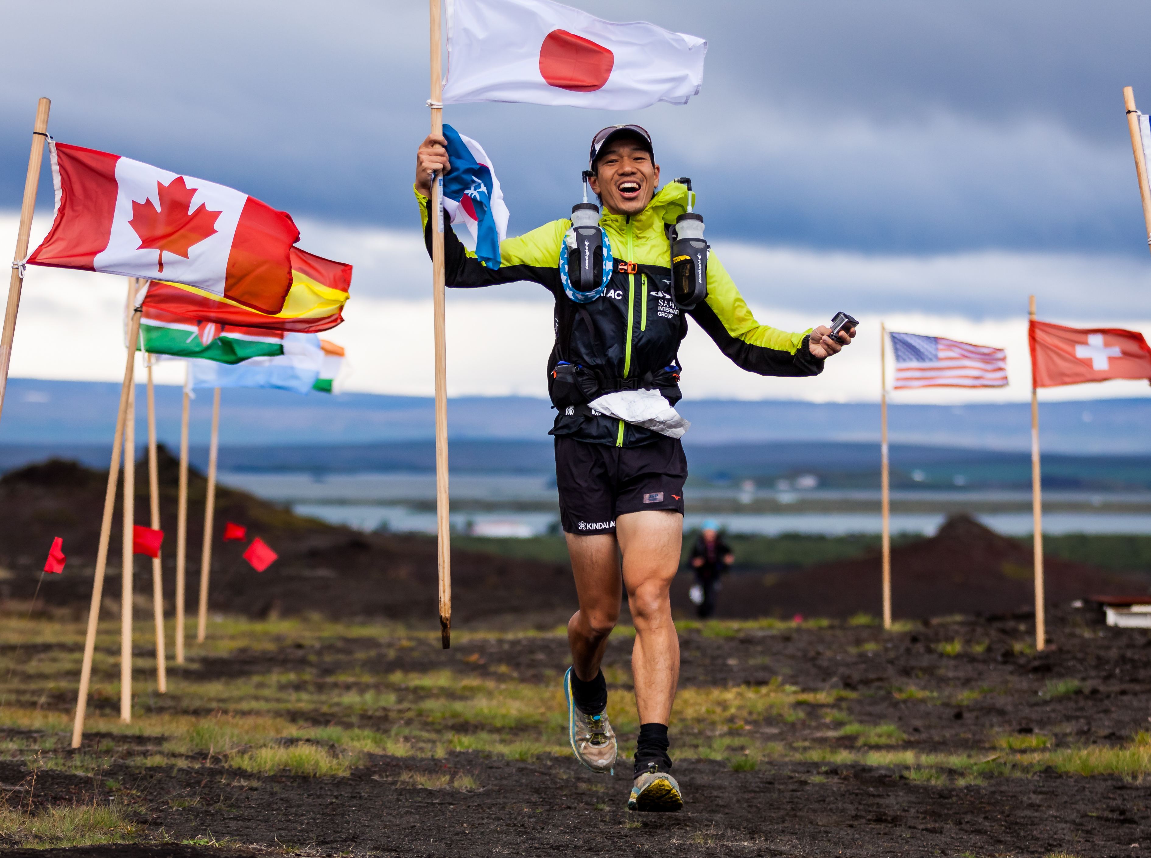 kitada takao